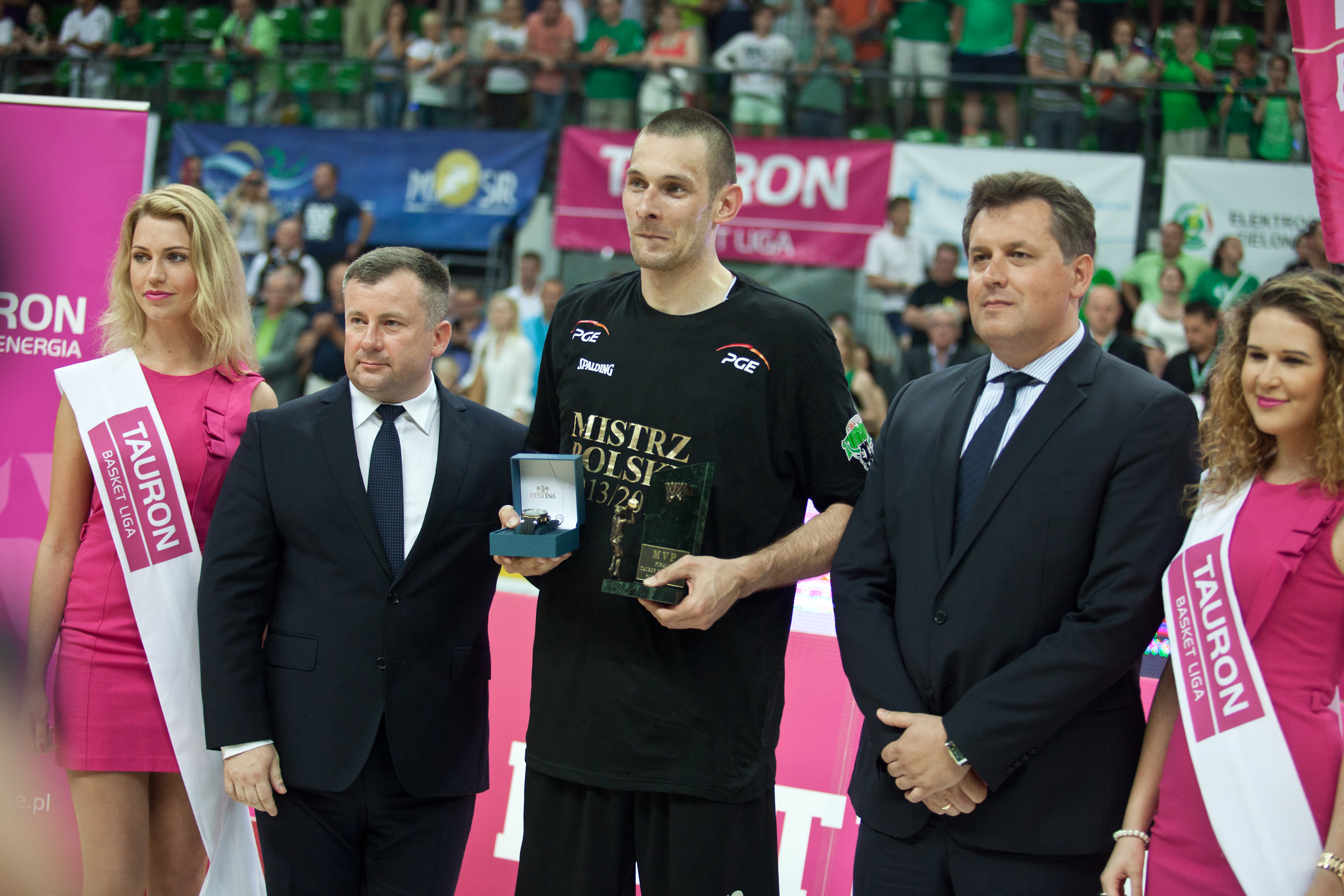 od lewej: Jacek Jakubowski Prezes Polskiej Ligi Koszykówki, Filip Dylewicz PGE Turów Zgorzelec MVP finałów Tauron Basket Ligi